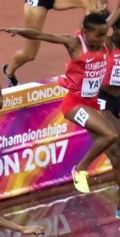 d7_24 3000mst dames finale